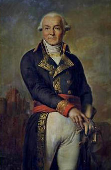 Le général Jean-François Berruyer, gouverneur des Invalides.